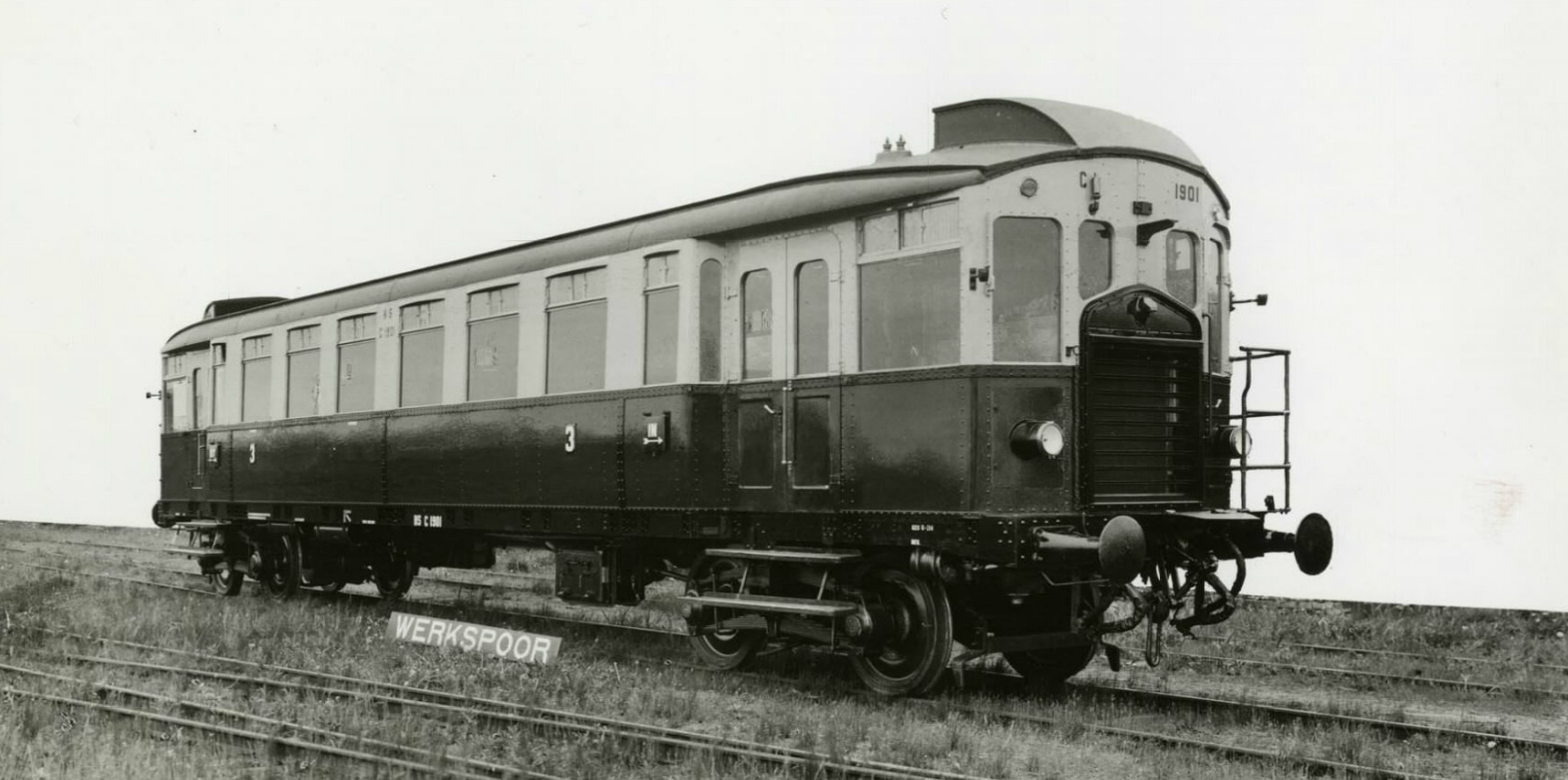 Foto van de BC 1901 voor de Nederlandse Spoorwegen op het terrein van Werkspoor in Utrecht. Foto gemaakt door Werkspoor. Het object, uitgegeven door een instantie, is vanaf 70 jaar na publicatie niet meer auteursrechtelijk beschermd.